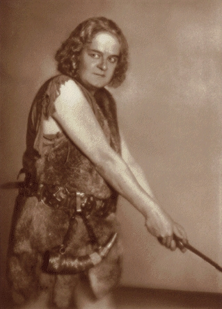 Sänger Fritz Soot als Siegfried auf einem Foto von Nicola Perscheid